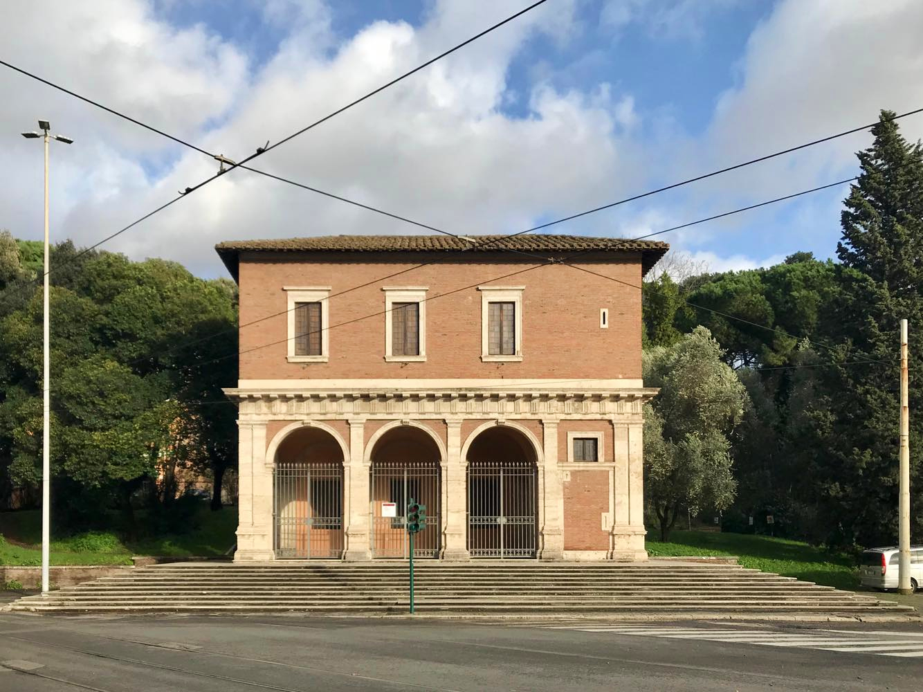 Casina del Vignola Boccapaduli in Rome